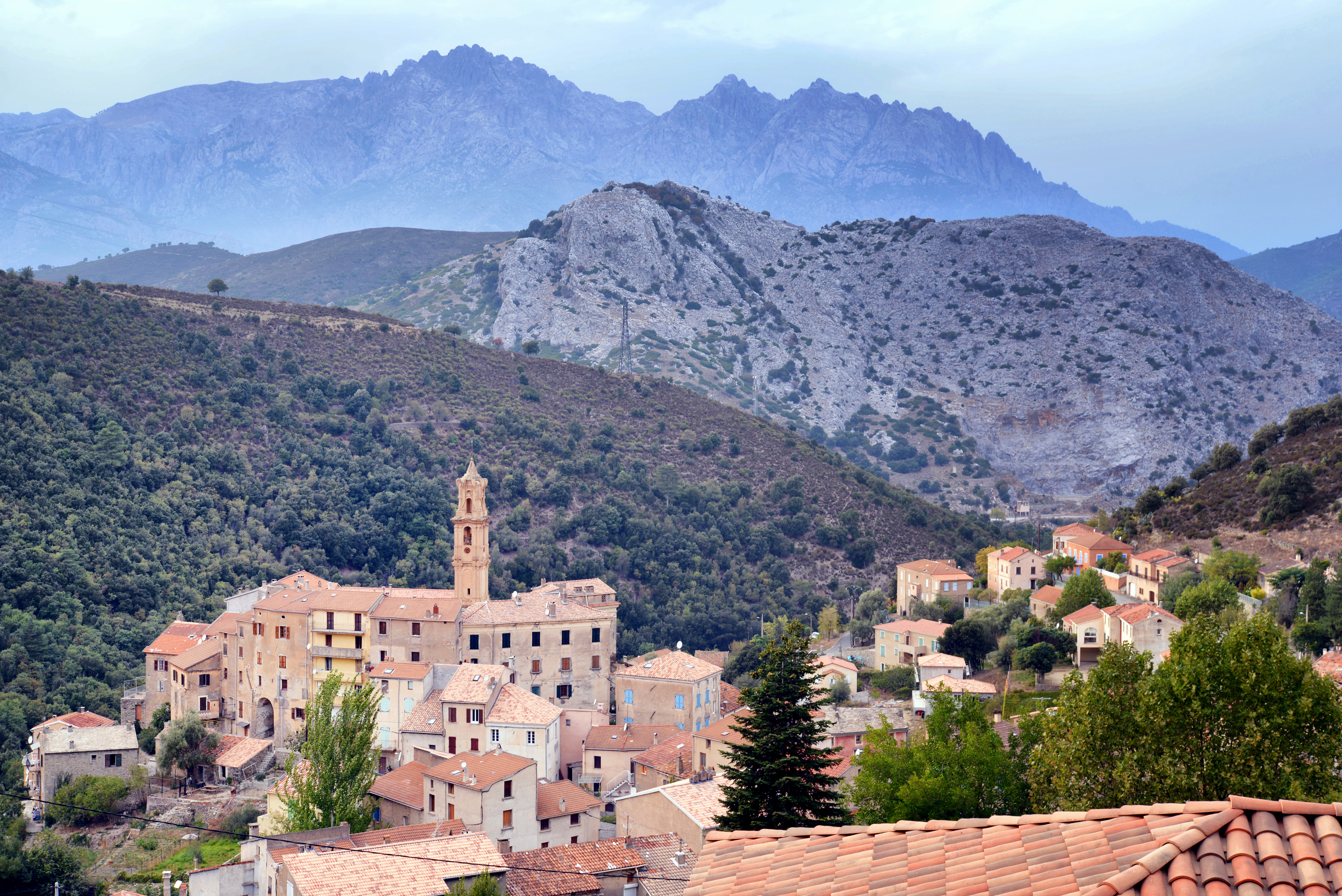 Omessa, Talcini (Corse) - Vue du village. Juste derrière, la montagne calcaire et la carrière dite « carrière de Caporalino ». En arrière-plan, les Aiguilles de Popolasca.